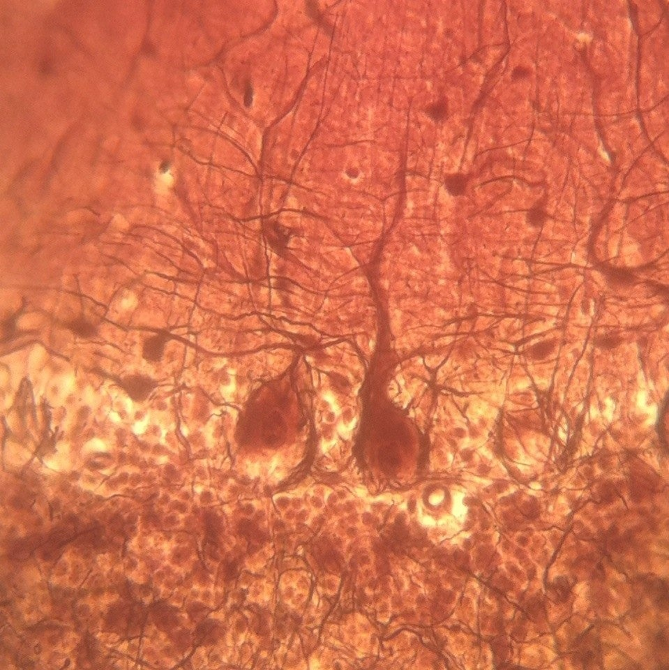 Гистологический срез коры мозжечка собаки, импрегнация нитратом серебра